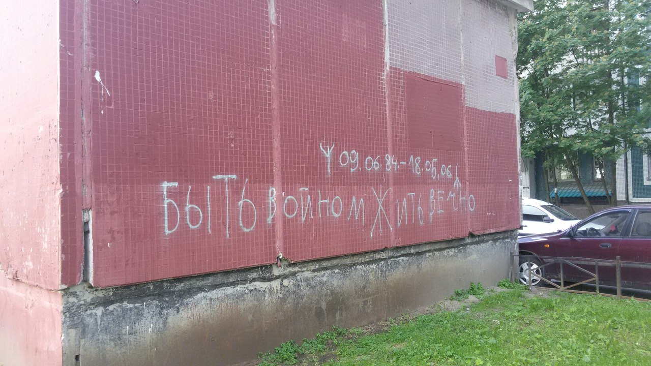 Надпись на трансформаторной будки рядом с местом гибели Дмитрия Боровикова